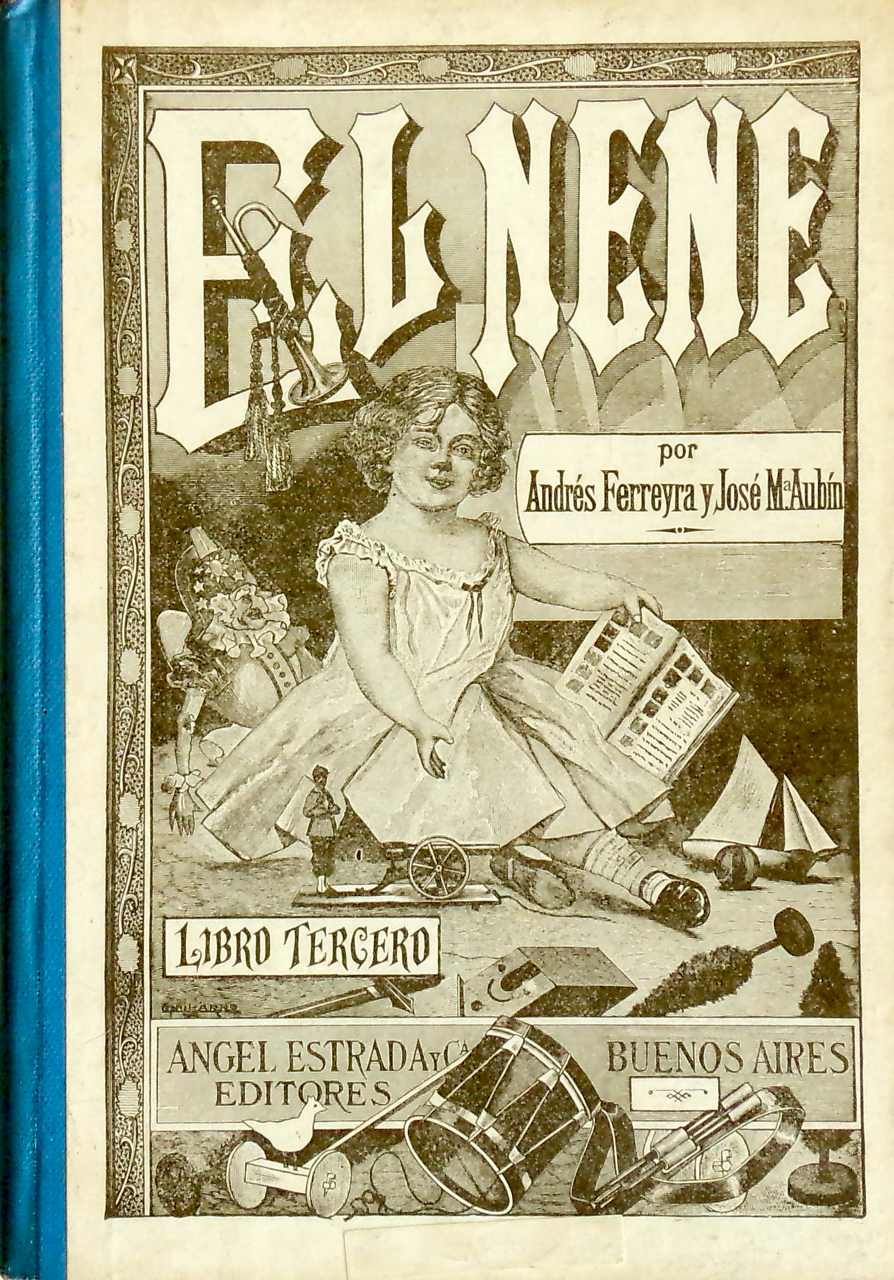 El nene, de Andrés Ferreyra (1863-1928), Editorial Estrada.